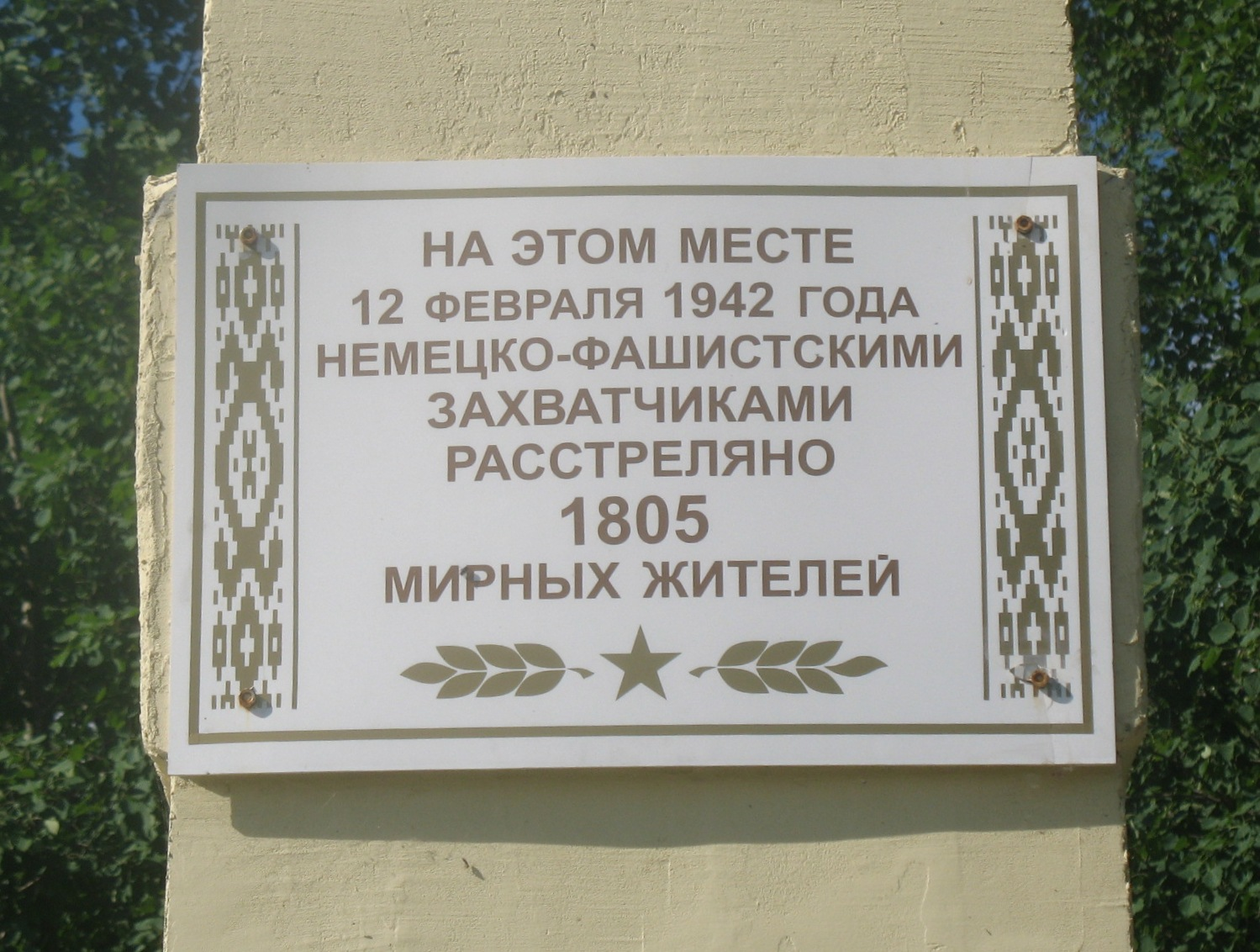 Надпись на памятнике евреям из гетто в Чашниках, убитых нацистами и коллаборационистами. Установлен в деревне Заречная Слобода (Чашникский район, Витебская область).